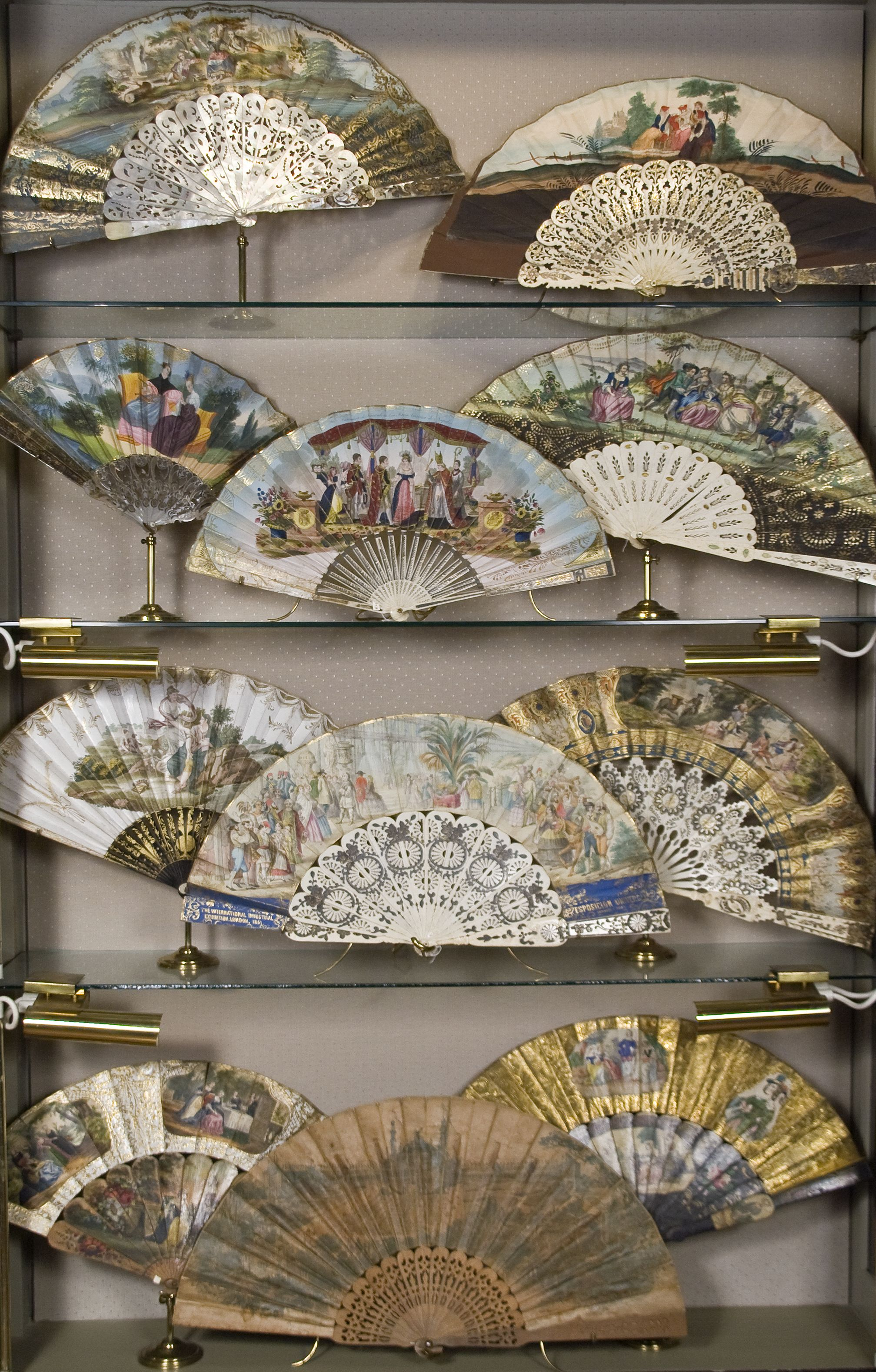 Ventalls Gabinet col·leccionista - Fot. Victor Oliva.jpg